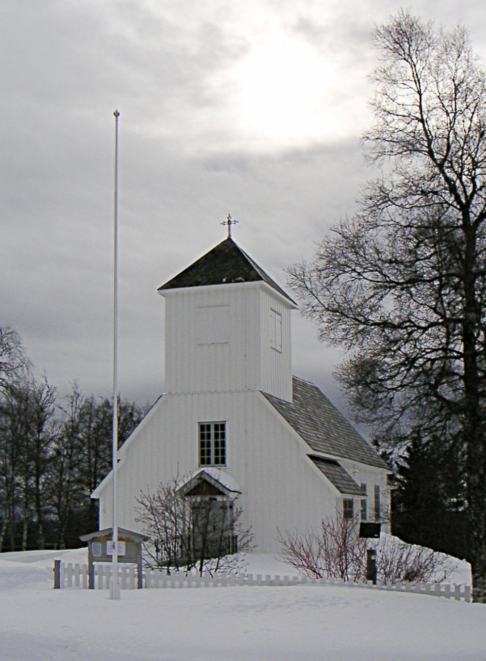 Leirskogen Church, at Leirskogen, Sør-Aurdal, Norway (Leirskogen kirke)